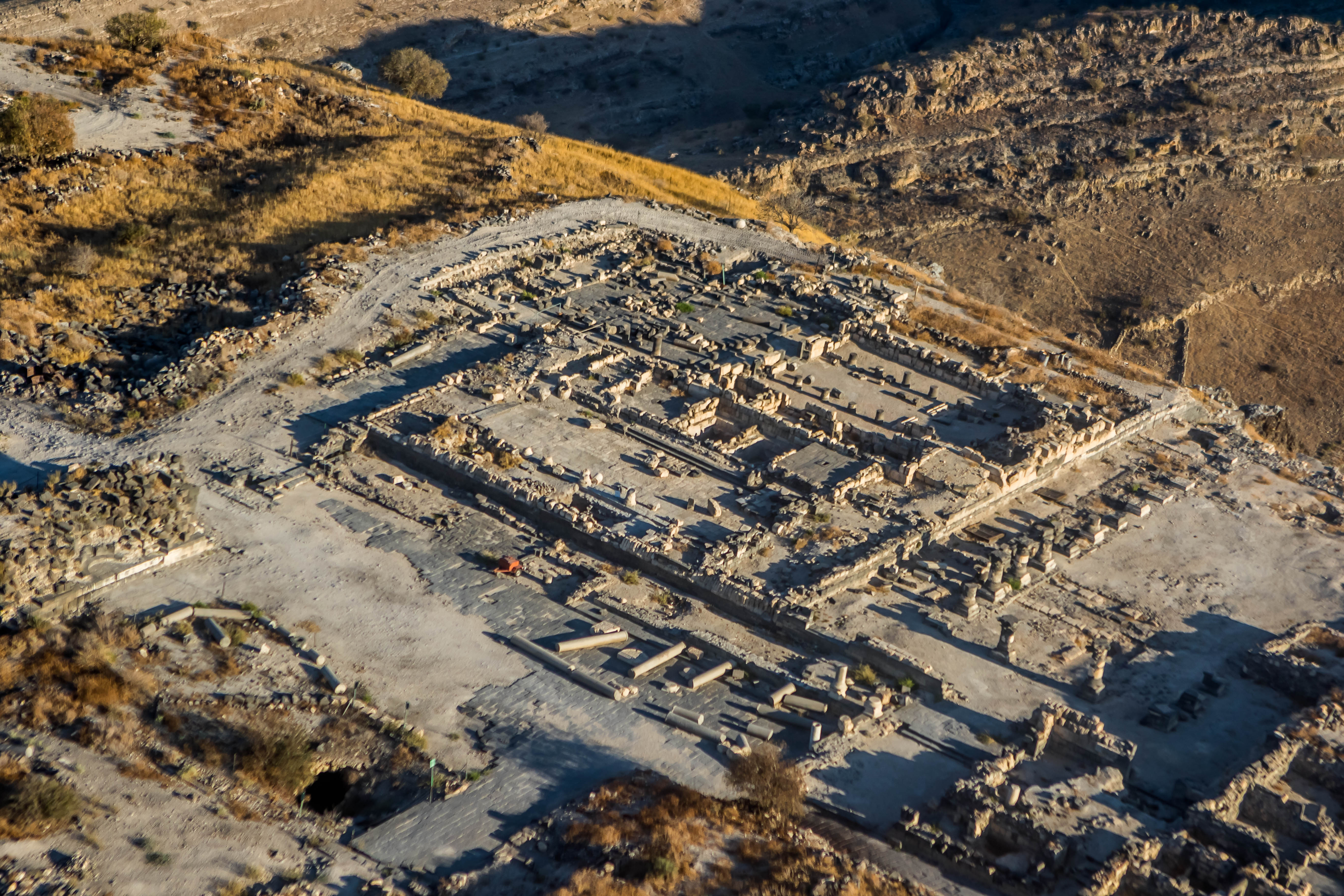 סוסיתא נוסדה כעיר מדינה (פוליס) ככל הנראה באמצע המאה ה-2 לפנה"ס בידי הממלכה הסלאוקית.